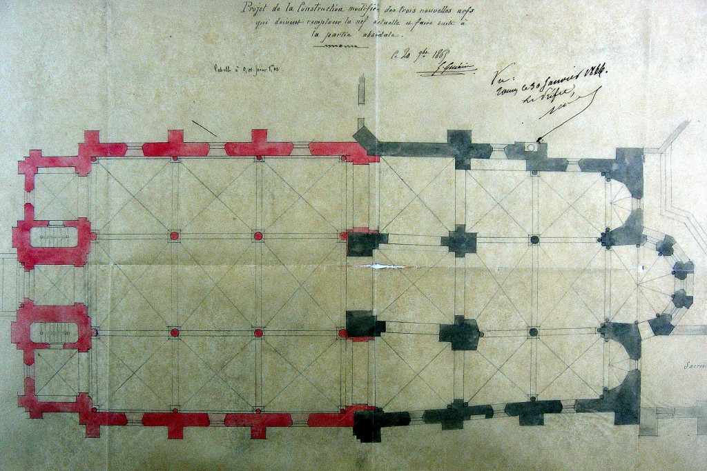 plan au sol, issu des archives départementales.